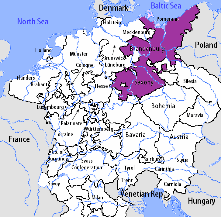 see Image:Upper_Saxon_Circle-2005-10-14-en.png